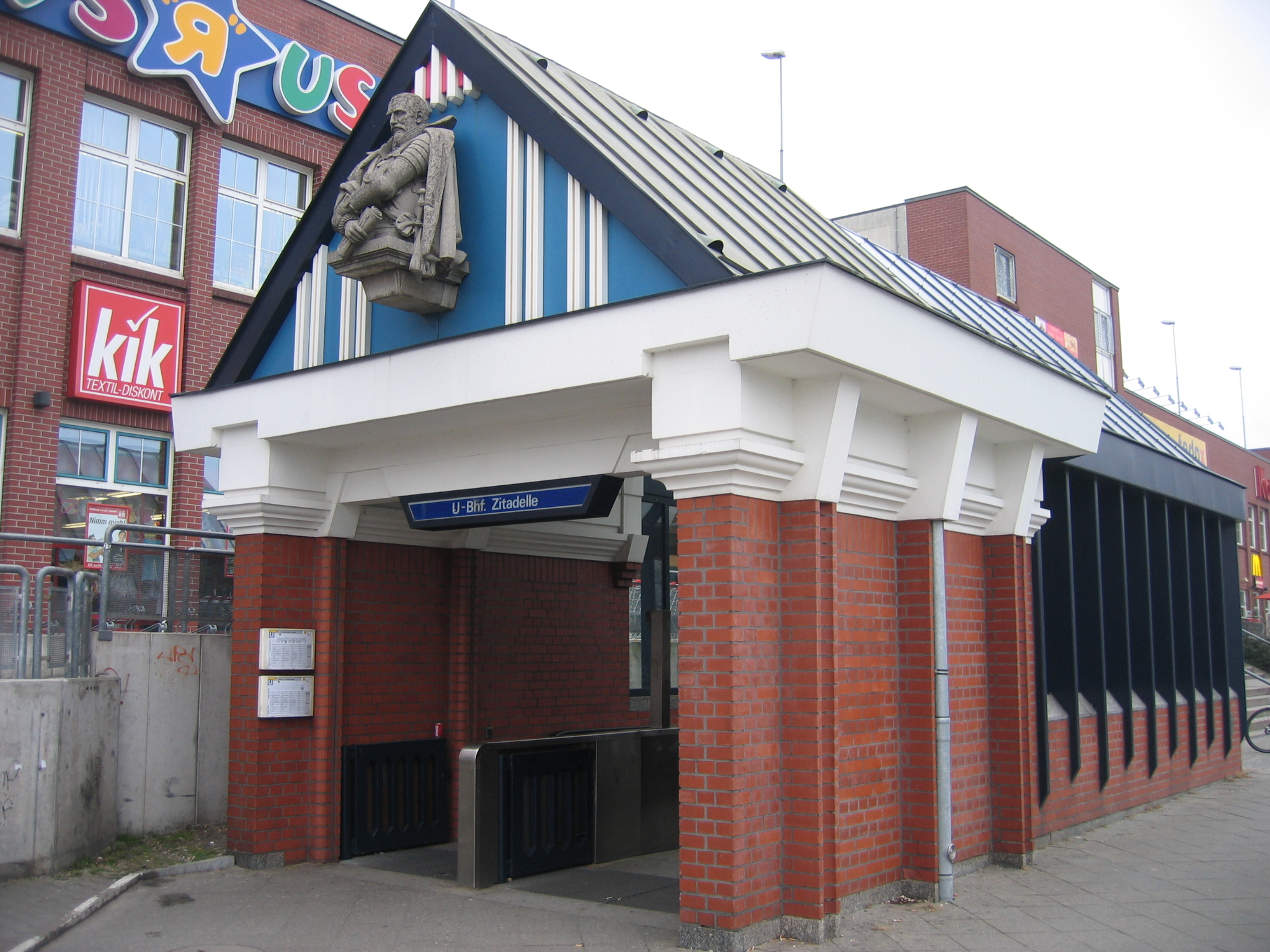 Eingangsgebäude U-Bahnhof Zitadelle, Berlin